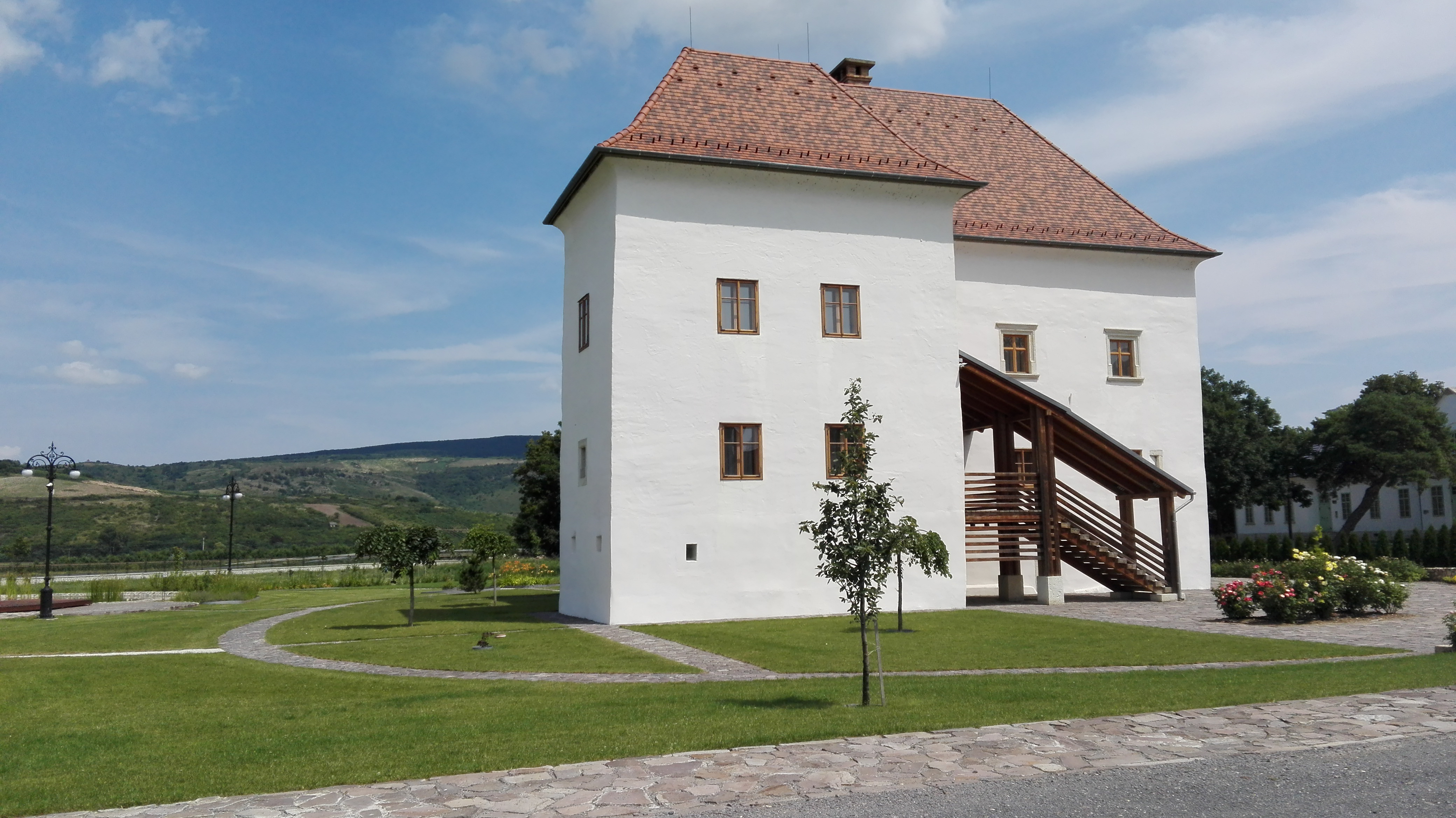 Vay-castle (old) of Golop, Hungary